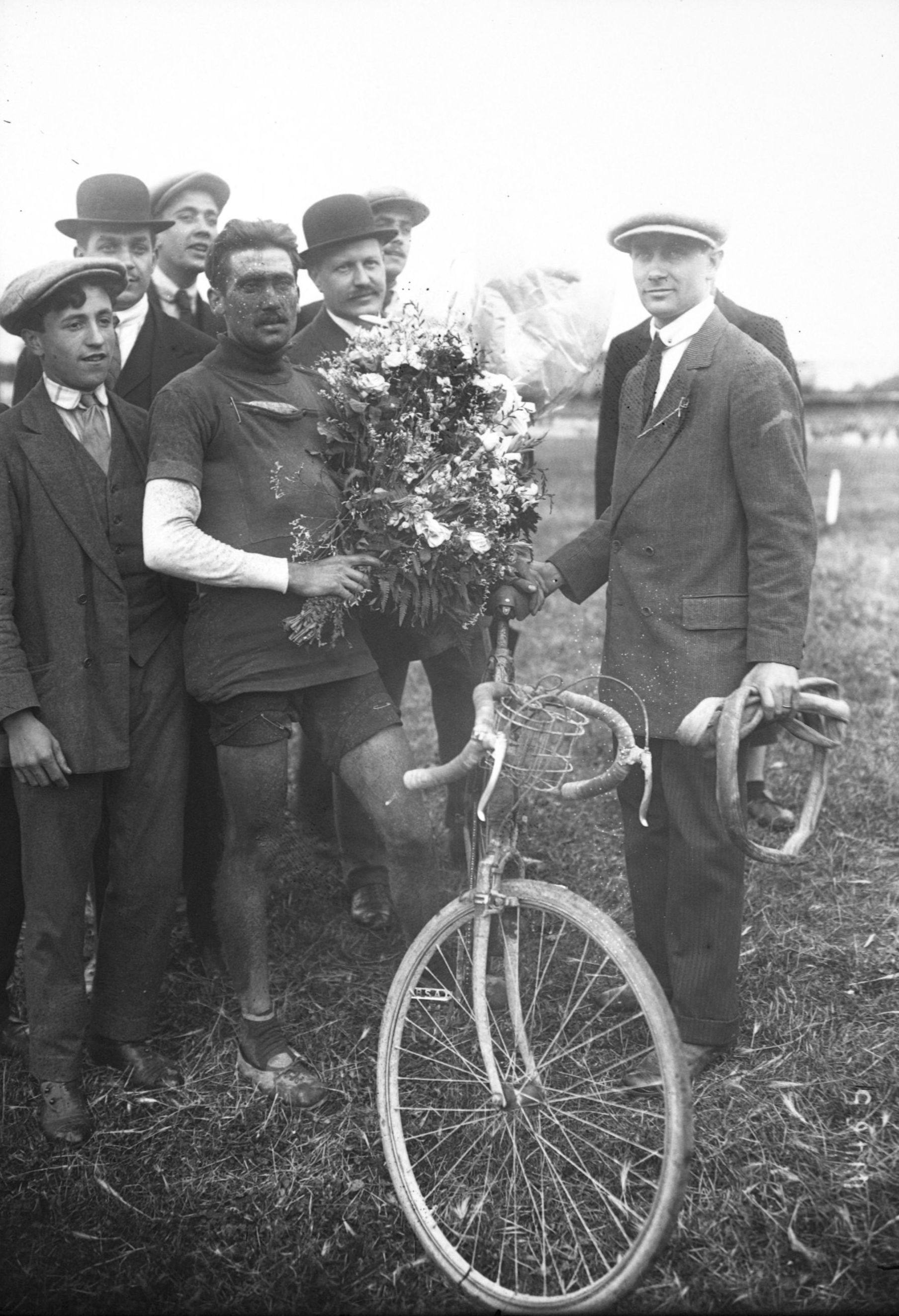 Henri Pélissier à l'arrivée du Tour de France 1914